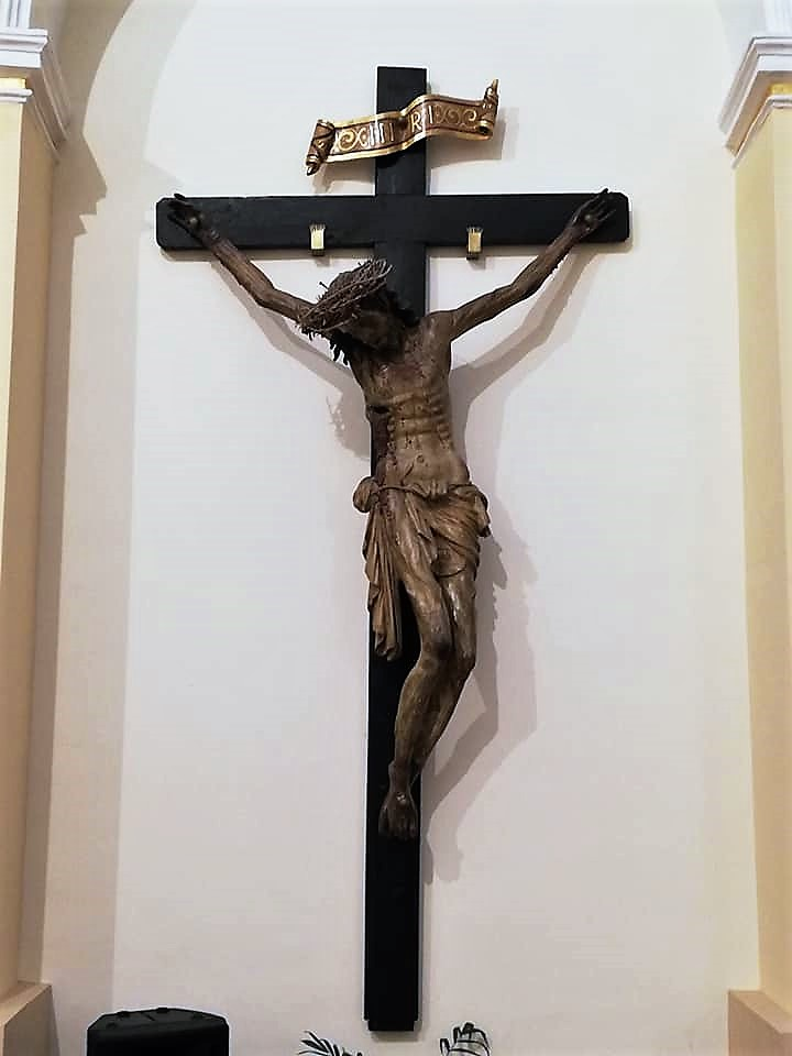 Crocifisso.